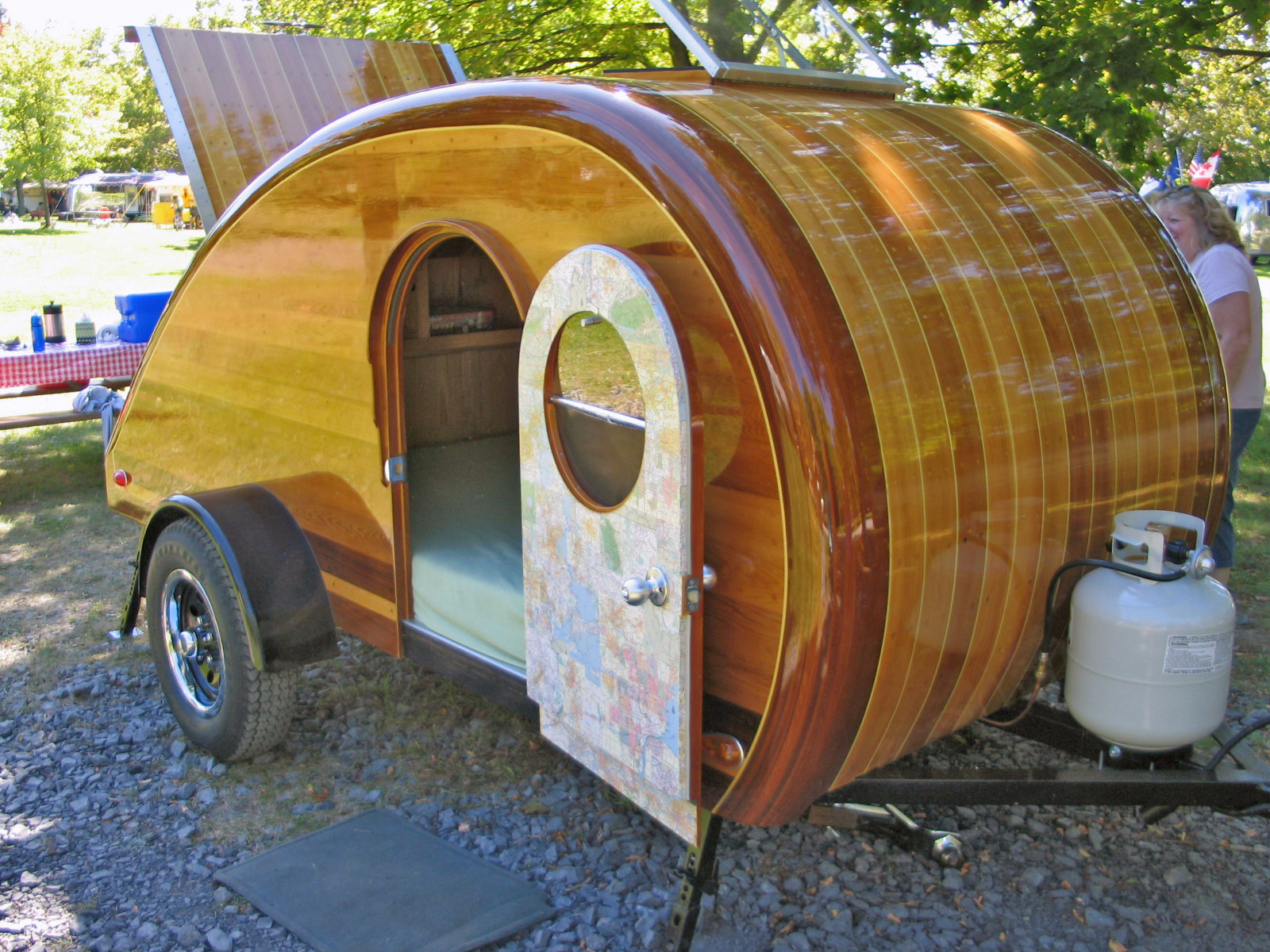 Homemade Teardrop